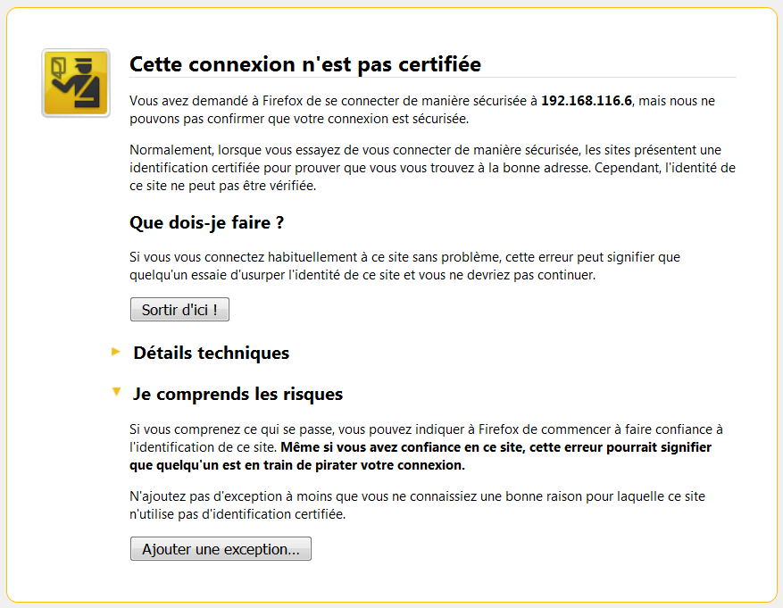 Avertissement Firefox en cas de certificat SSL autosigné